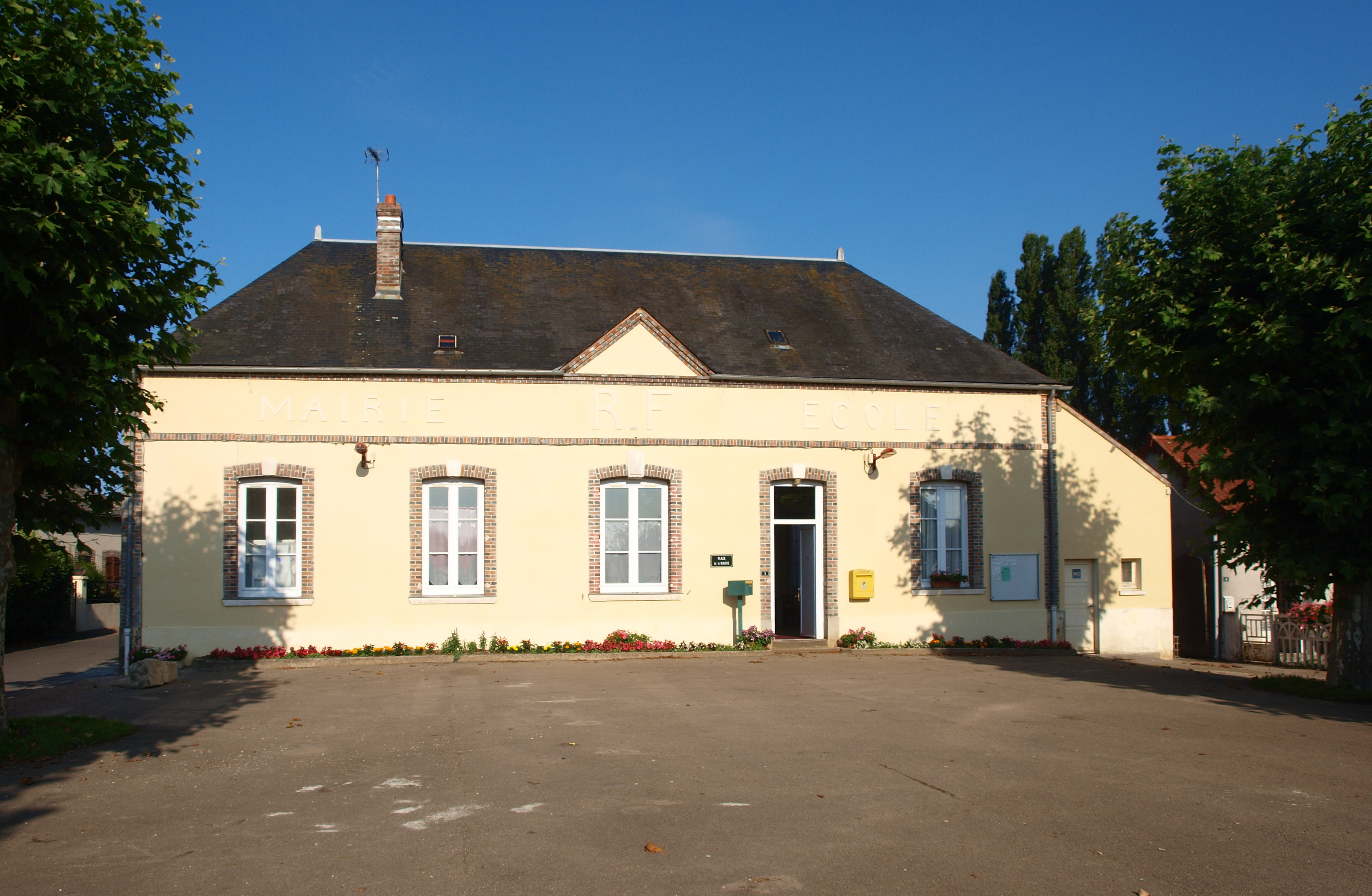 Septfonds (Yonne, France)